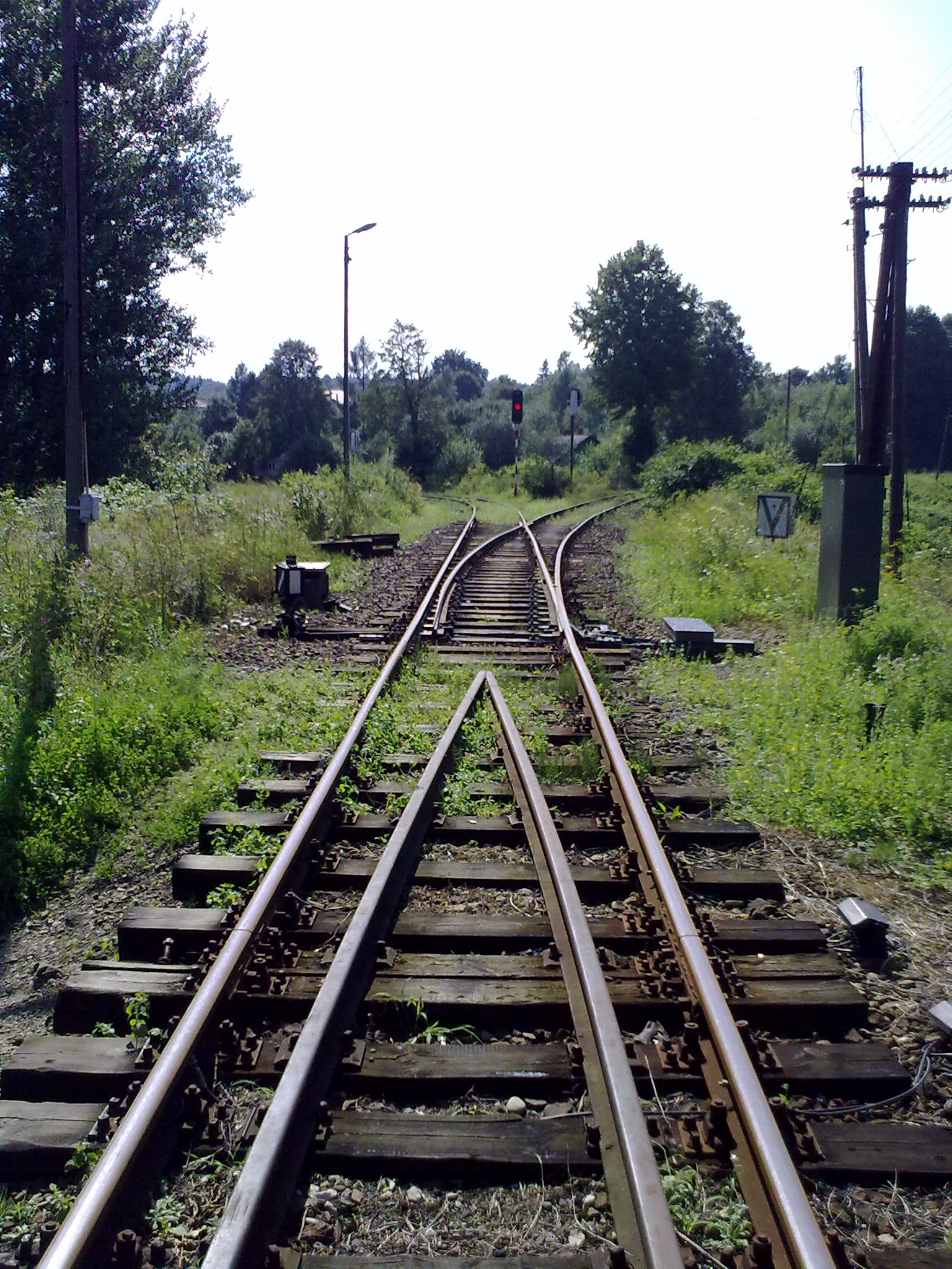 Koniec łącznicy kolejowej nr 617 w miejscowości Zagórz (Rozjazd nr 101).